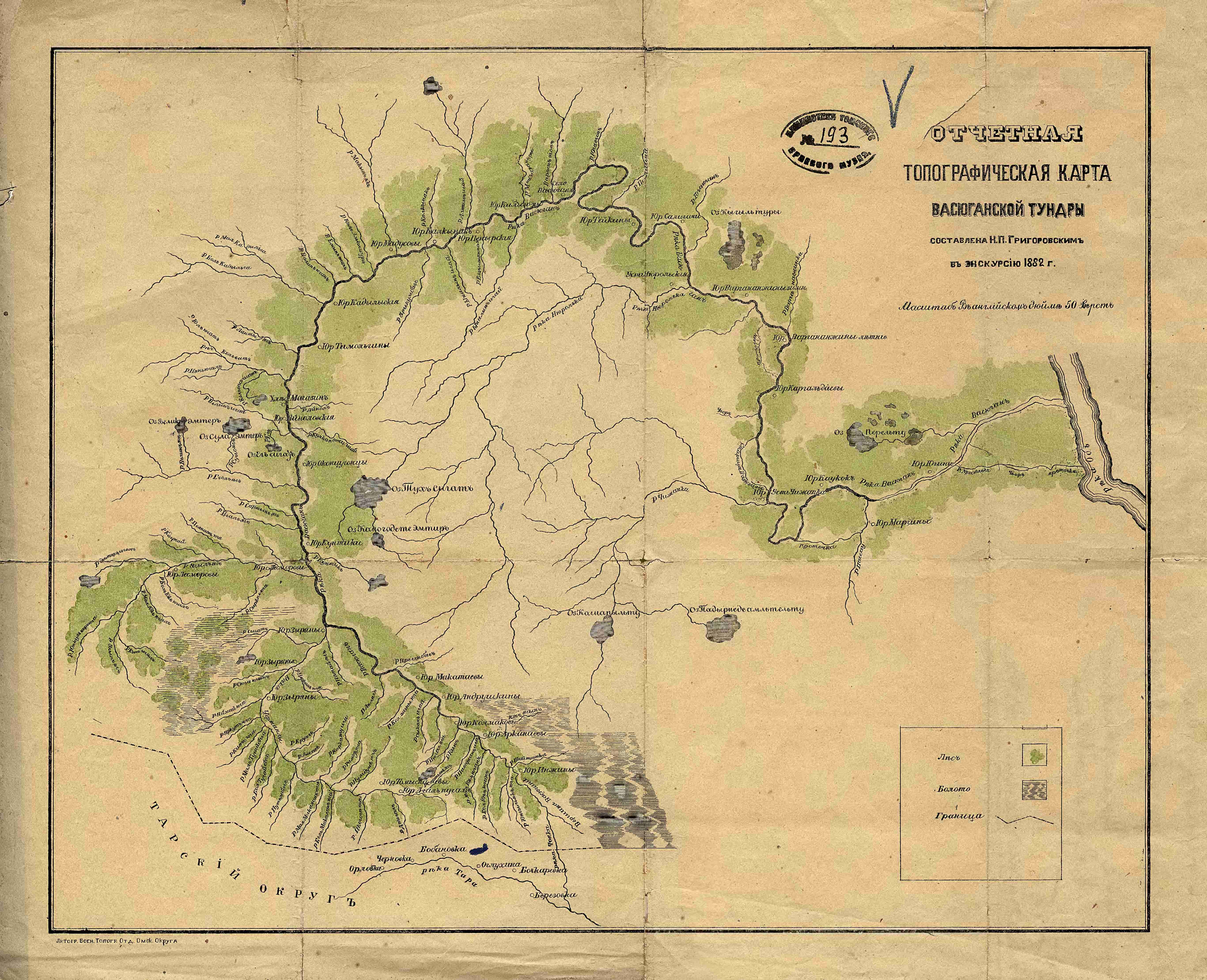 Отчётная топографическая карта Васюганской тундры